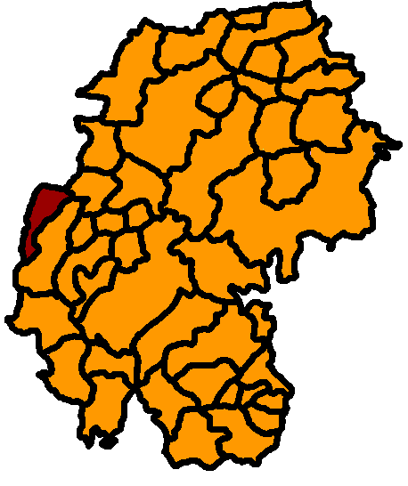 Frankenhain hervorgehoben, Ilm-Kreis